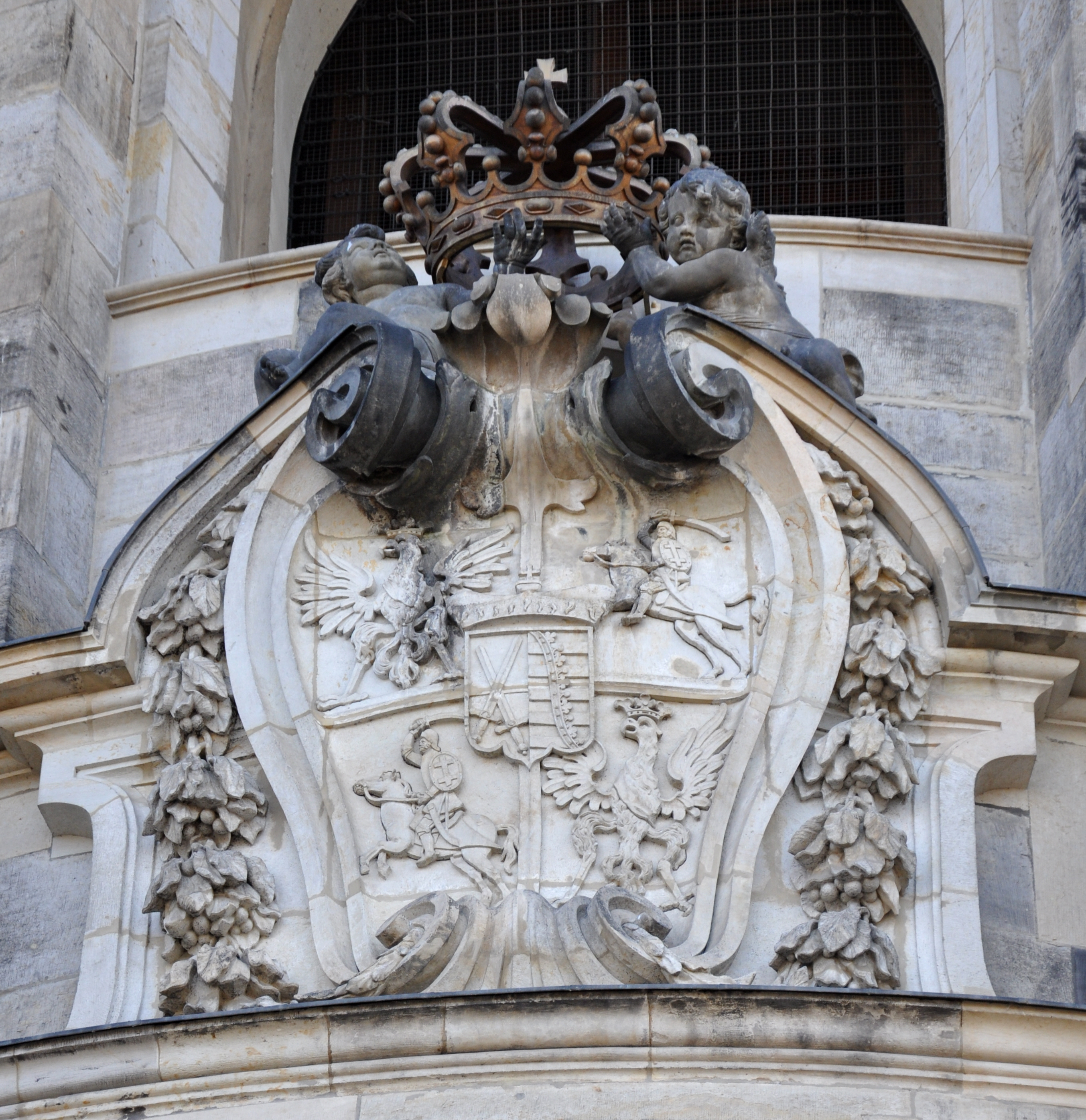 Dresden, Hofkirche, Wappen